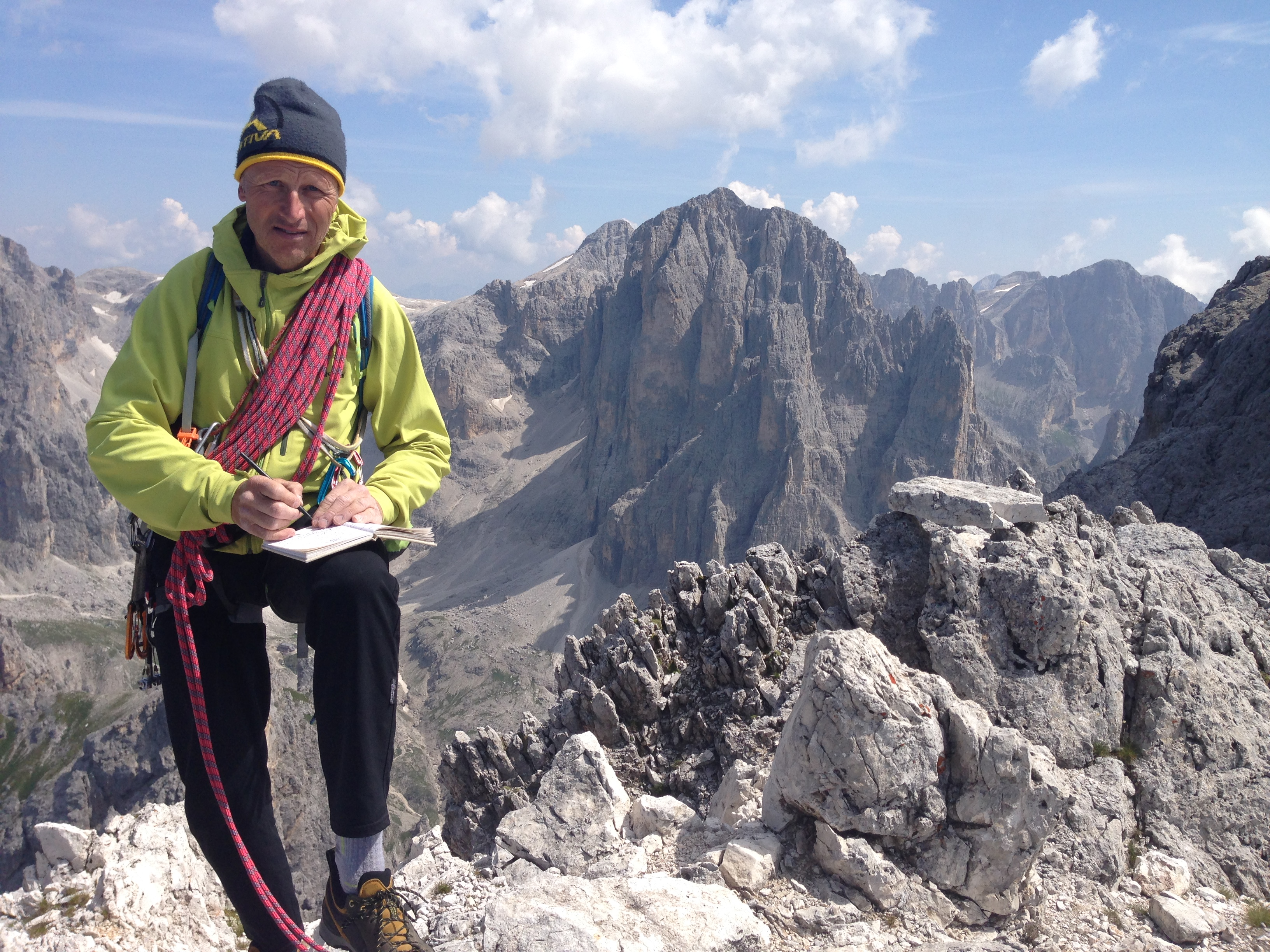 Philippe Brass dans les Dolomites